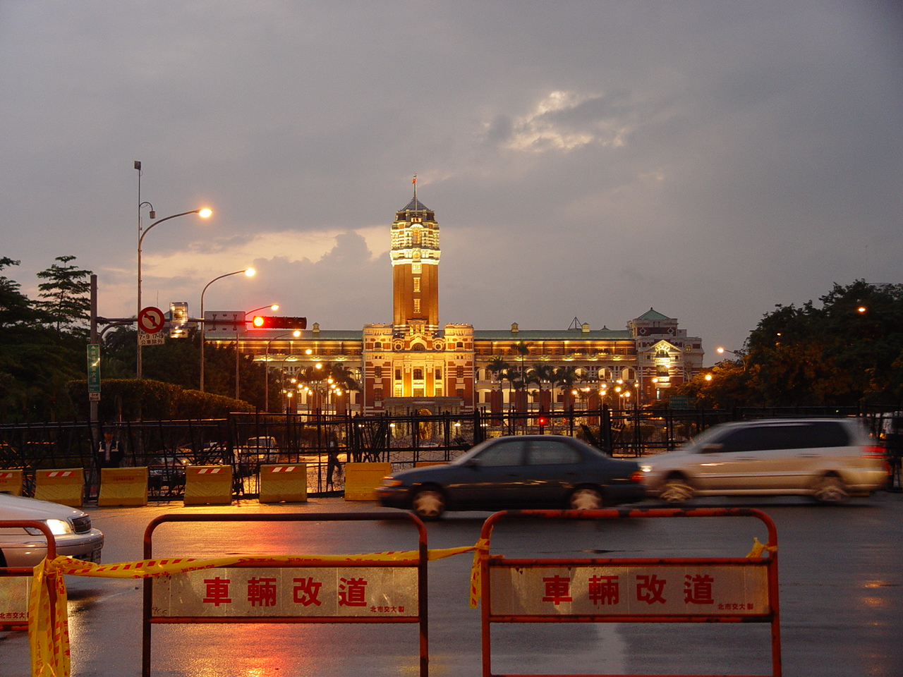 中文（台灣）: 2006年反貪腐抗議活動時期的臺北市總統府前一景。Bân-lâm-gú: 2006-nî huán tham-hú khòng-gī ua̍h-tōng sî-kî ê Tâi-pak-tshī Tsóng-thóng-hú tsiân it-kíng. 2006年反貪腐抗議活動時期的臺北市總統府前一景。